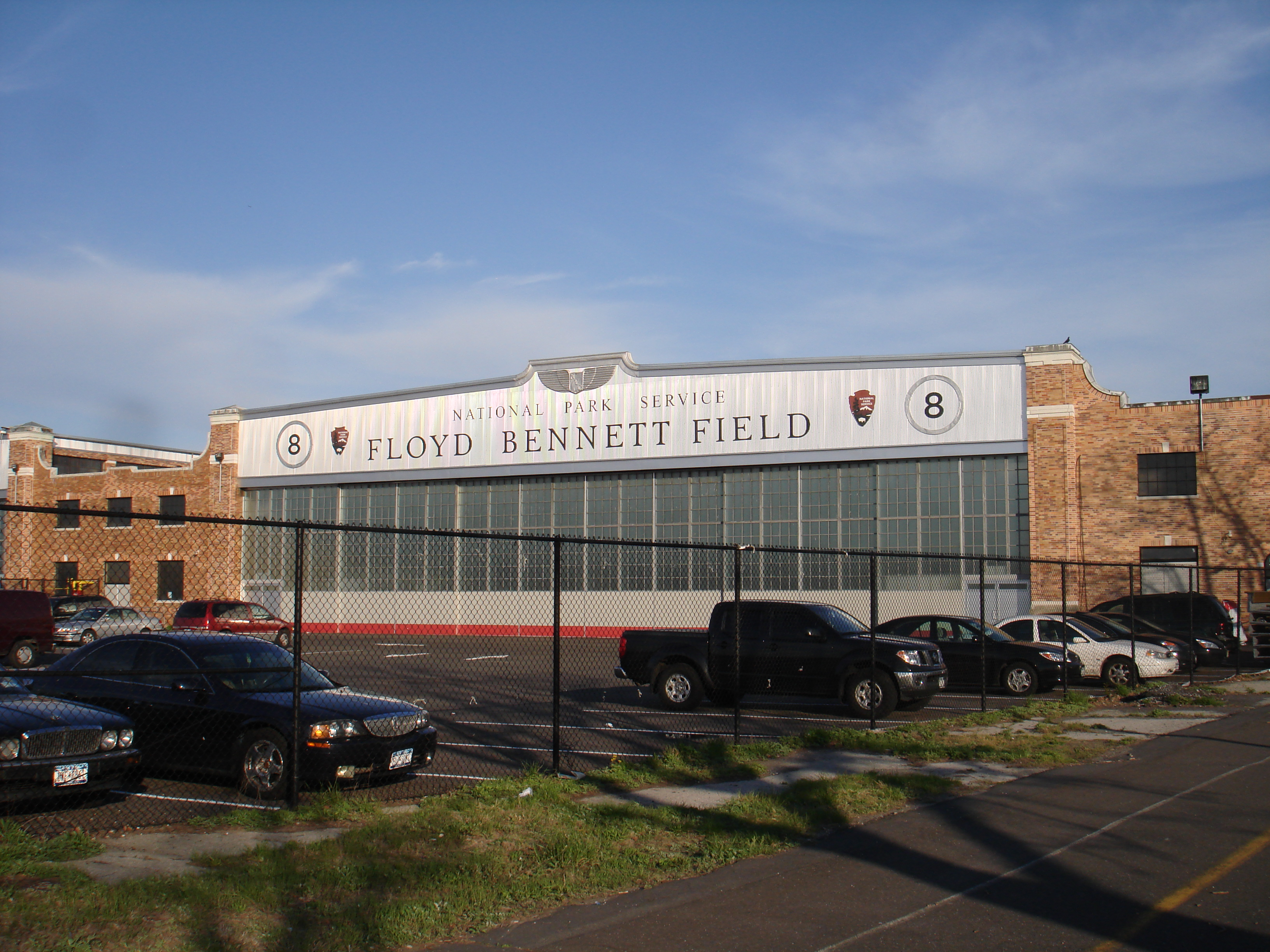 Floyd Bennett Field - 1